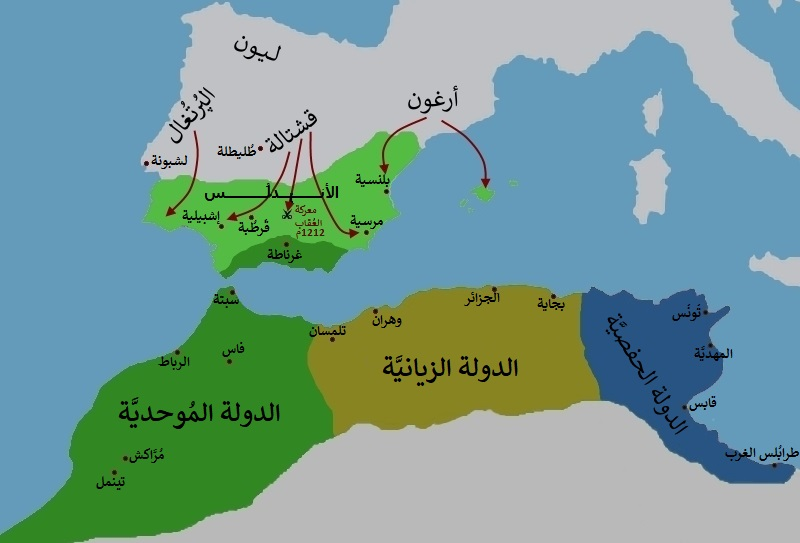 الدولة المُوحديَّة بعد سنة 1212م